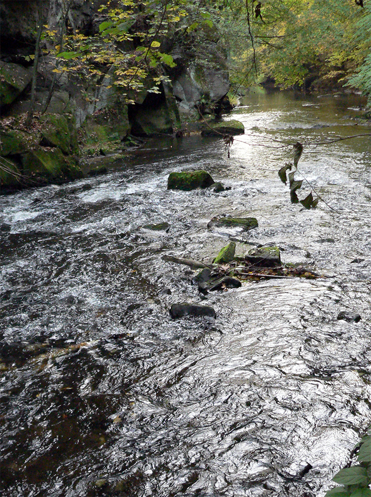 Wesenitz im Liebethaler Grund in der Sächsischen Schweiz